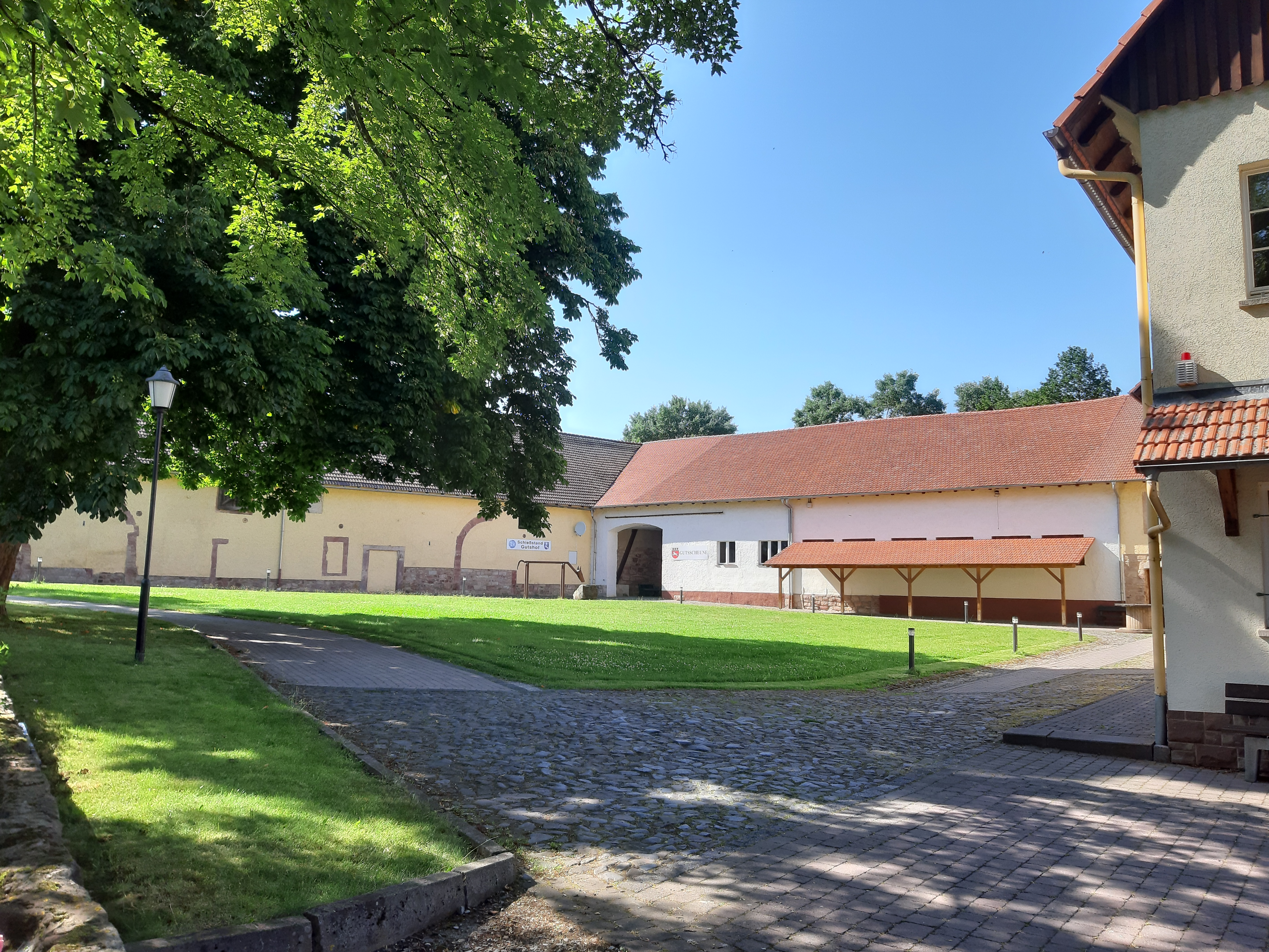 Roßdorf, Thüringen, ehemaliger Gutshof